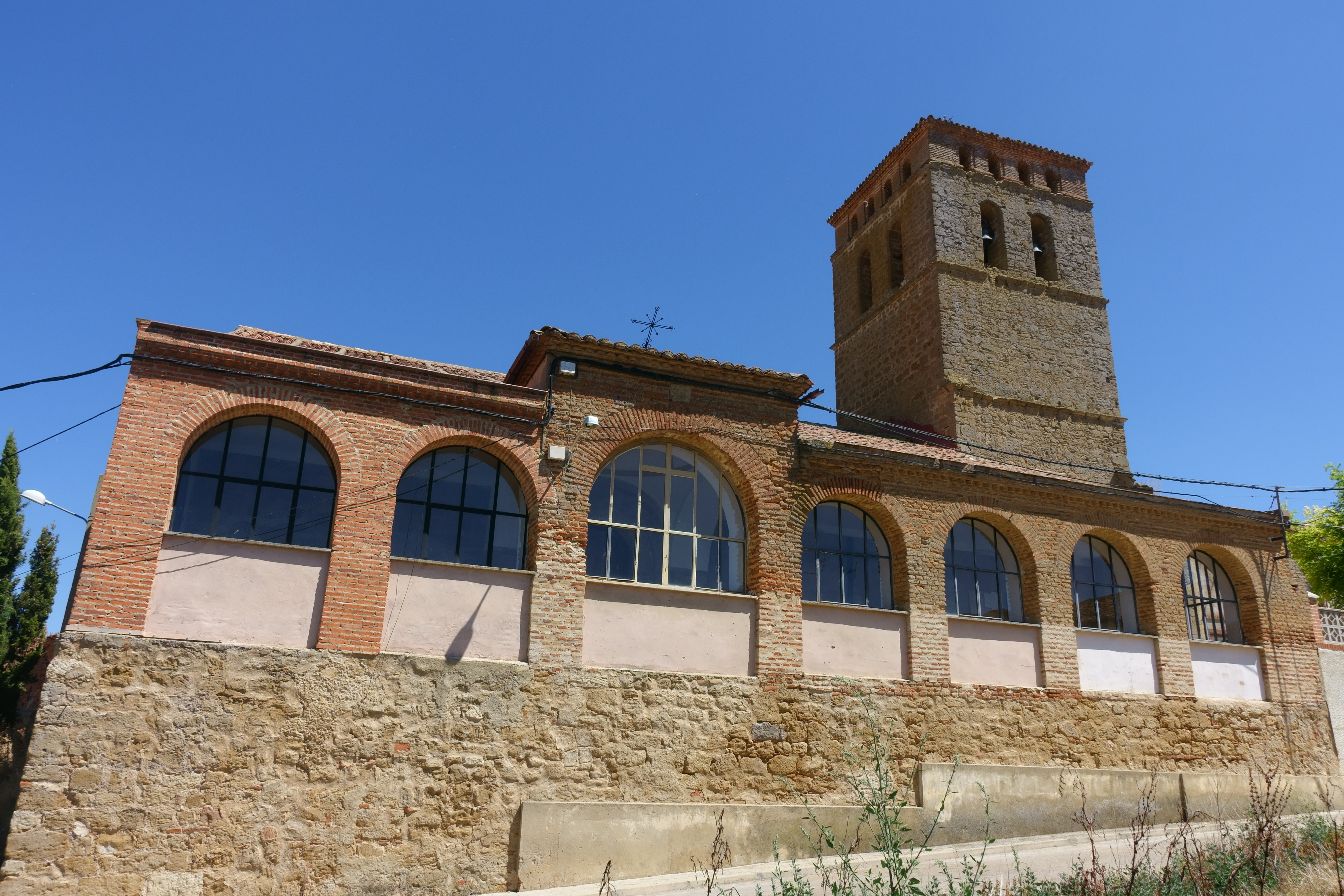 Iglesia de San Pedro ad Vincula, Saelices de Mayorga (Valladolid, España).